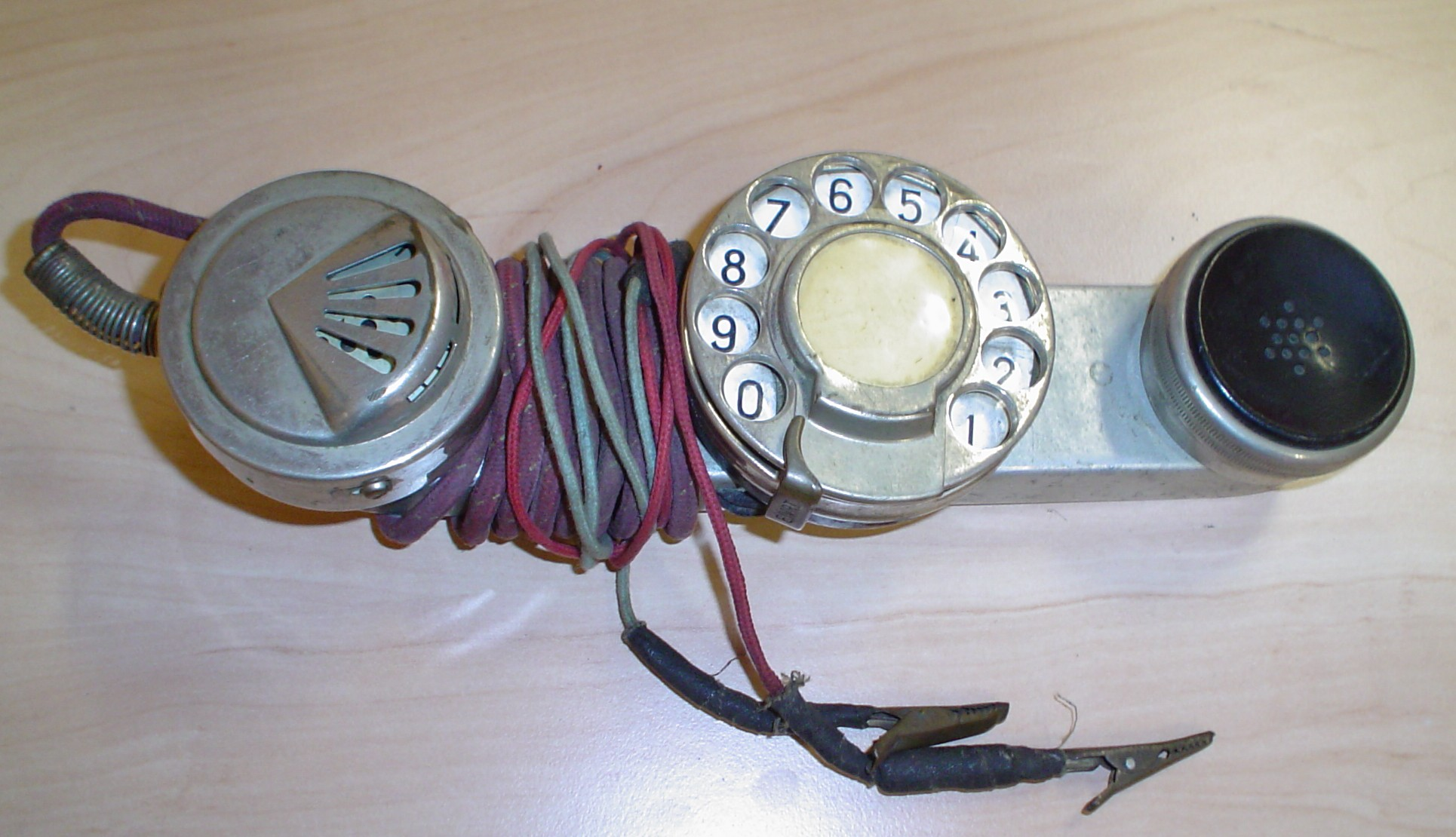 Riparista telefono